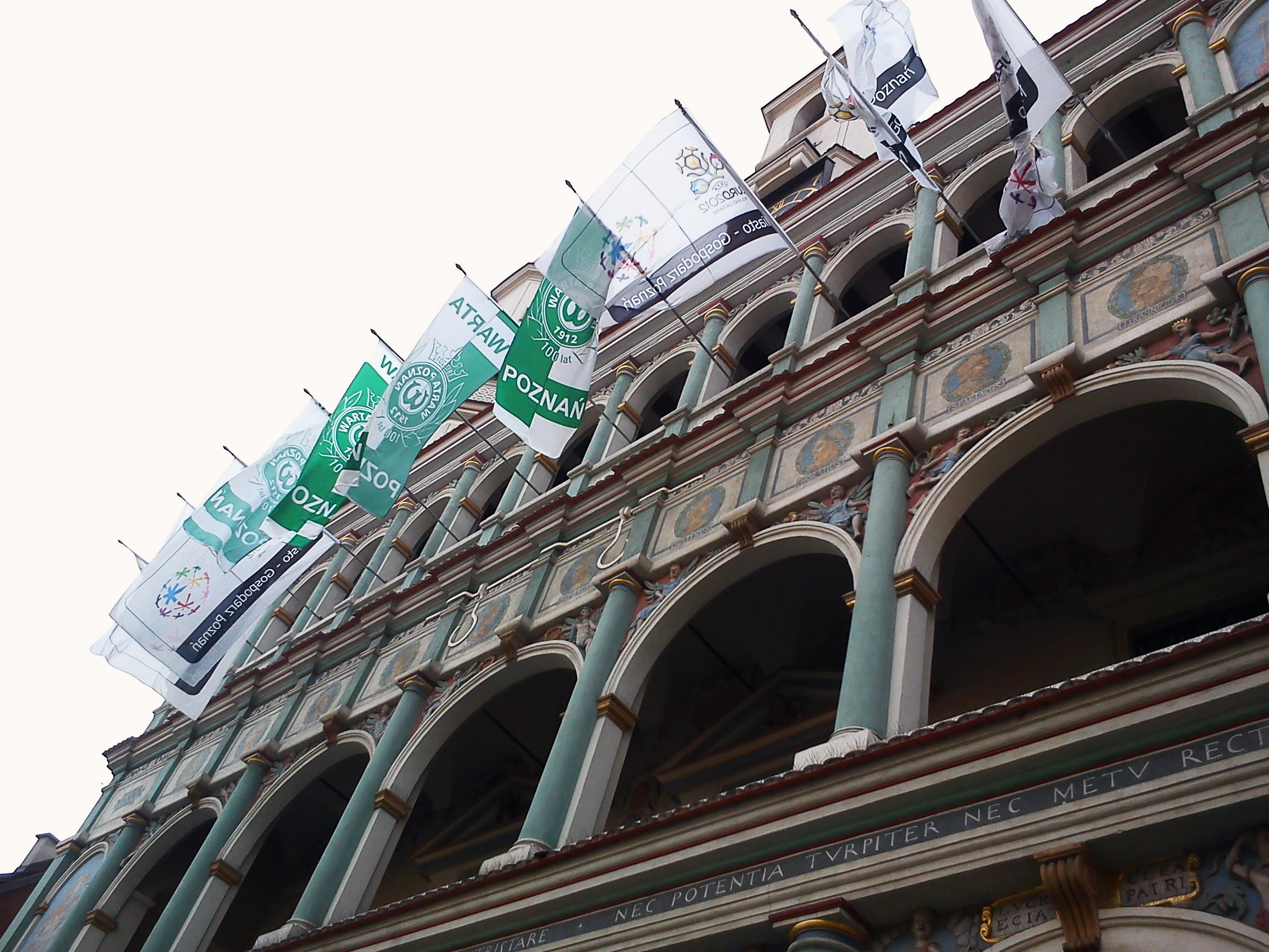 City Hall, Poznań. EURO 2012.